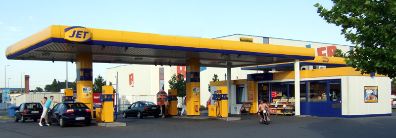 Eine Jet-Tankstelle